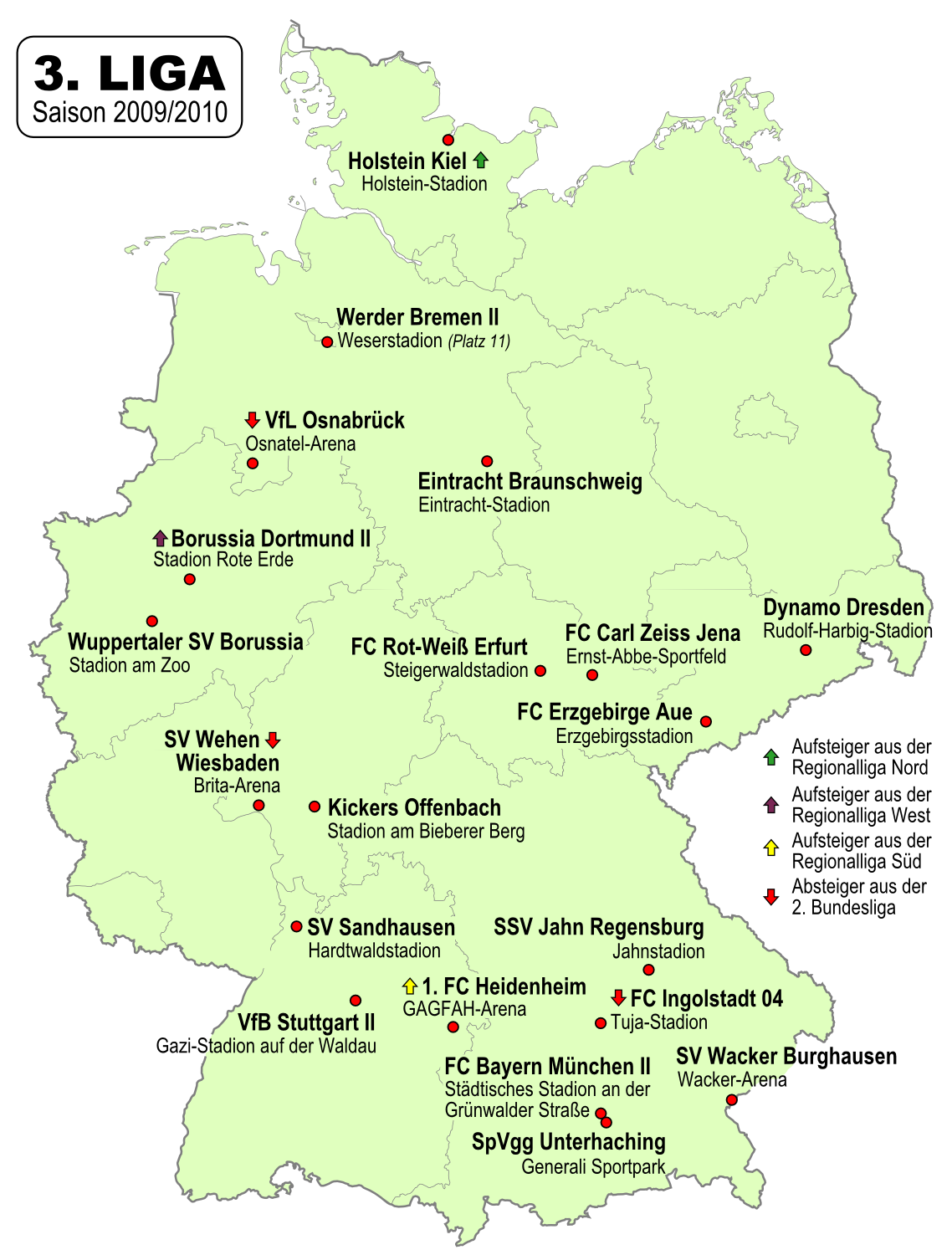 Karte der Vereine der 3. Fussball-Liga 2009/2010